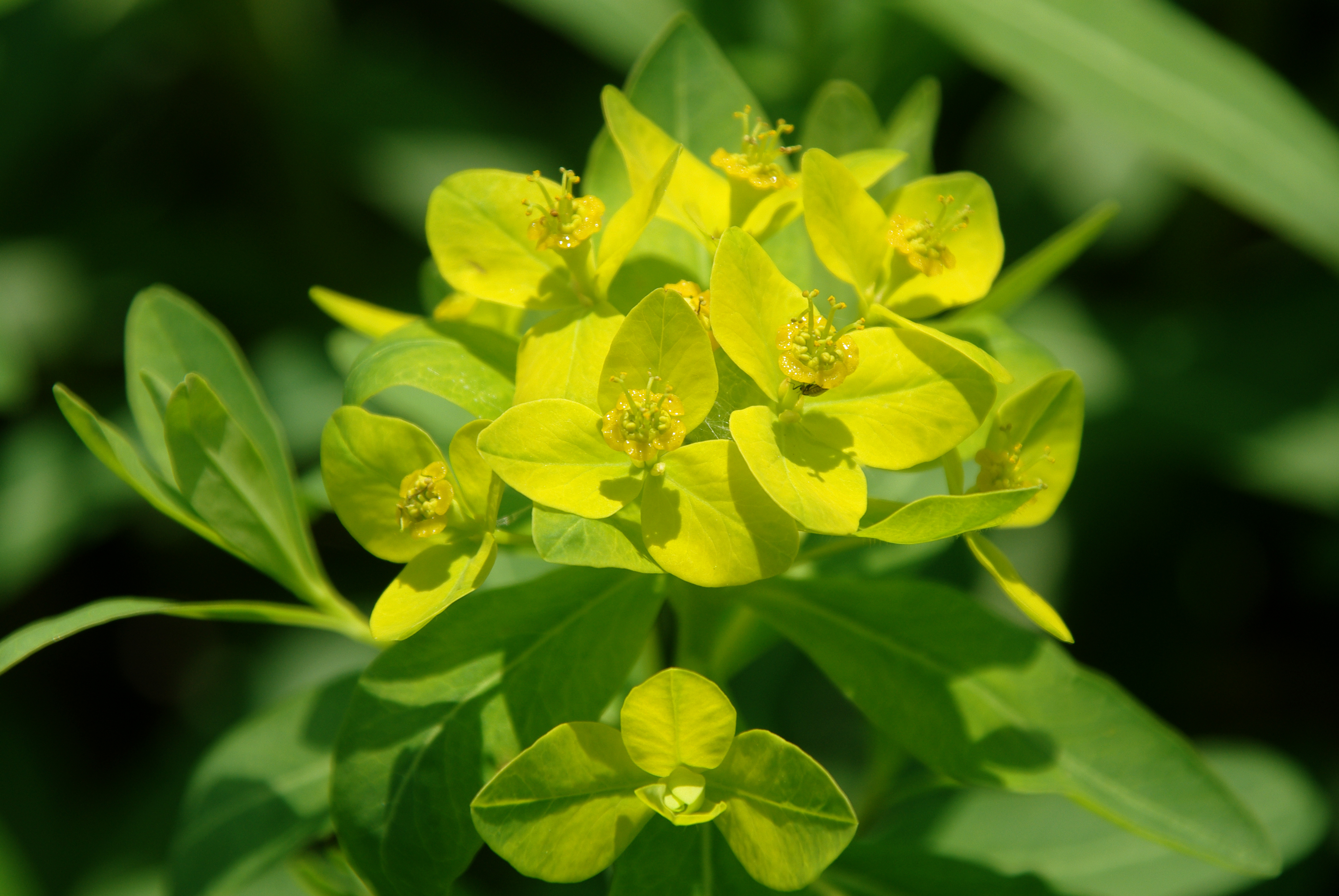 ノウルシ（静岡県富士市 浮島ヶ原自然公園で撮影）